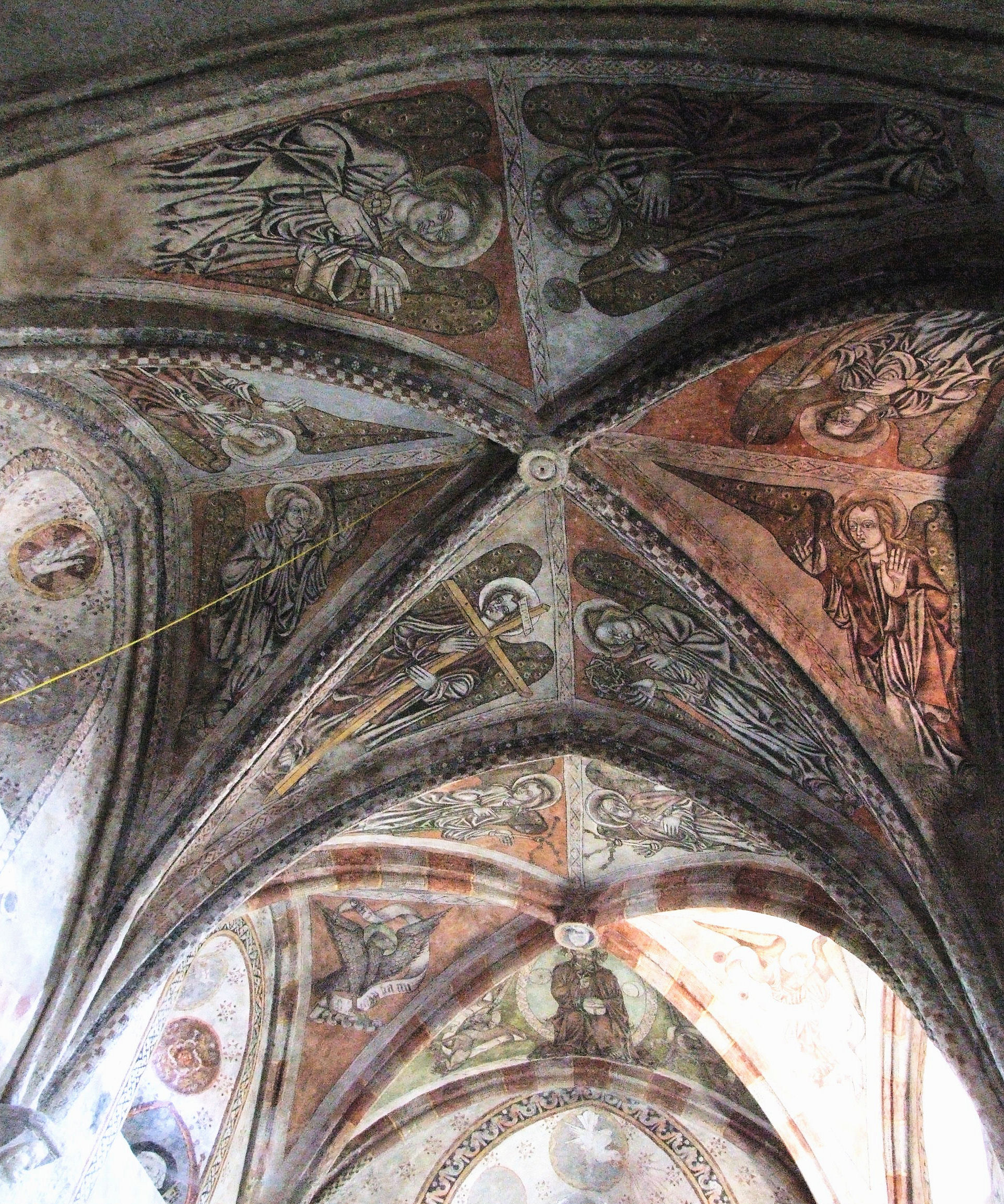 Eglise Saint-Cirgues - Fresques